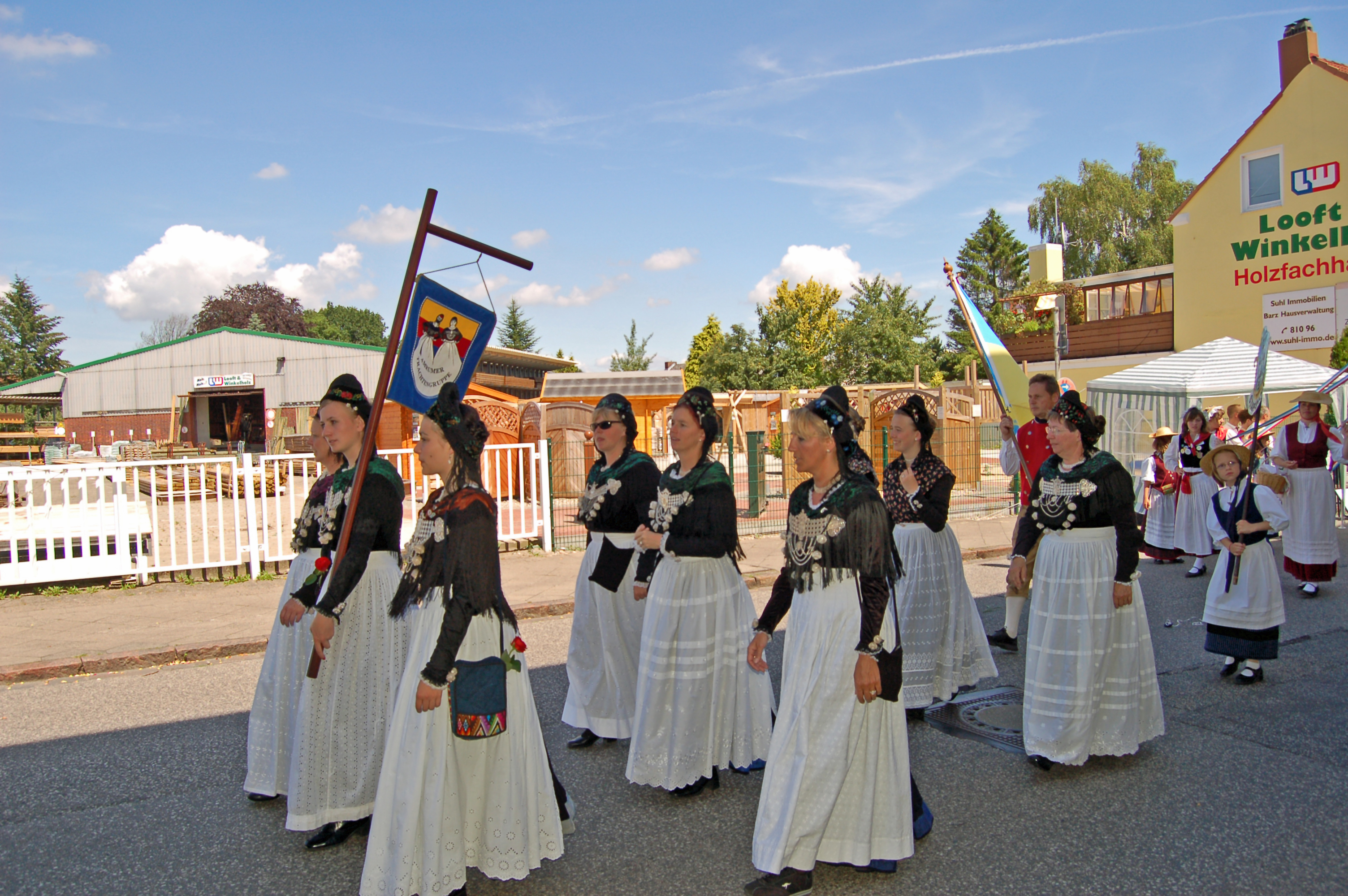 Festumzug der Trachtengruppe aus Amrum durch Uetersen während des Schleswig-Holteinischen Landestrachtenfest 2009. Das Trachtenfest fand anlässlich der 775-Jahr-Feier in Uetersen statt